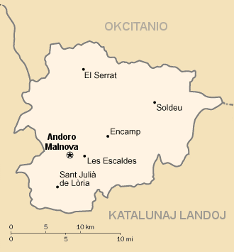 Mapo pri Andoro esperantigita. Tradukita el la CIA World Fact Book (publika dokumento). Vidu anglalingva versio ĉe :Dosiero:Andorra map.png.